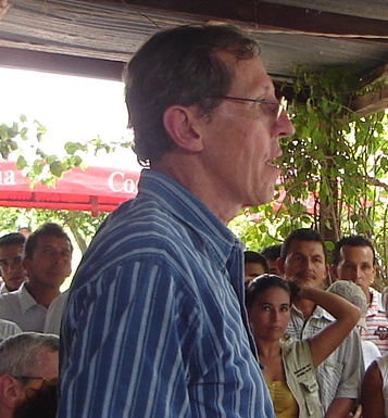 Antonio Navarro, Gobernador de Nariño, visita el Corregimiento Martín Pérez del Municipio El Rosario, donde se desarrolla el Programa "Si Se Puede"